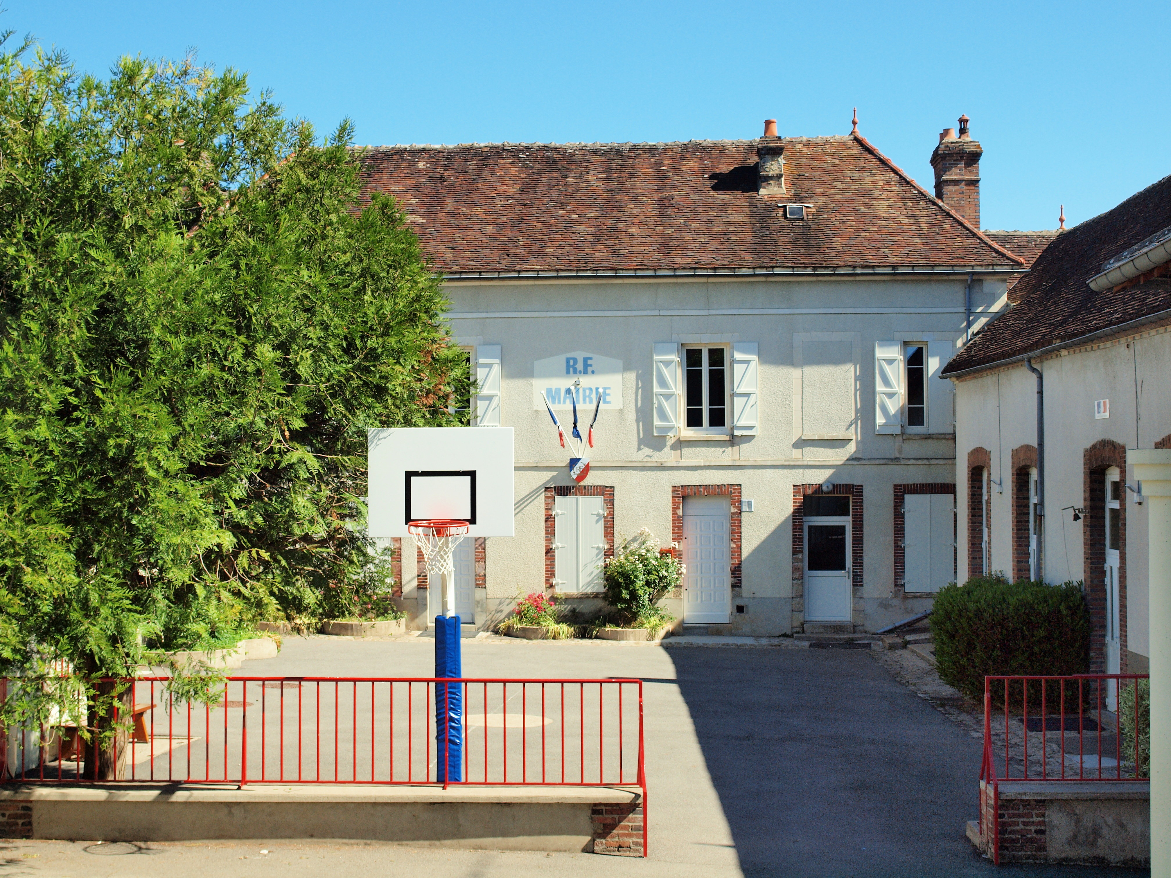 Marsangy (Yonne, France)